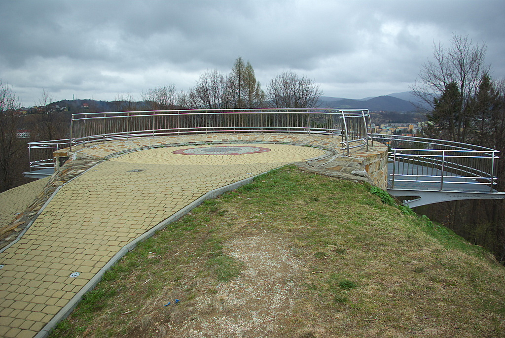 Platforma widokowa park Sanok